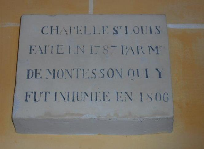 Inscription concernant Madame de Montesson, église de Seine-Port